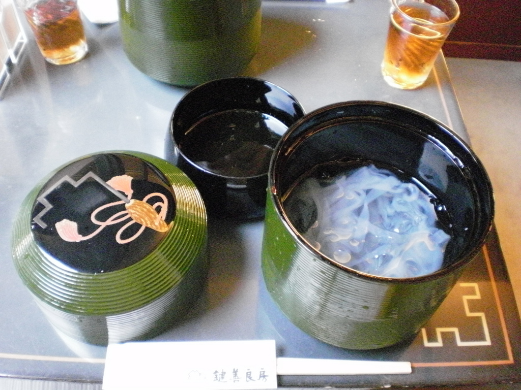 Kuzukiri